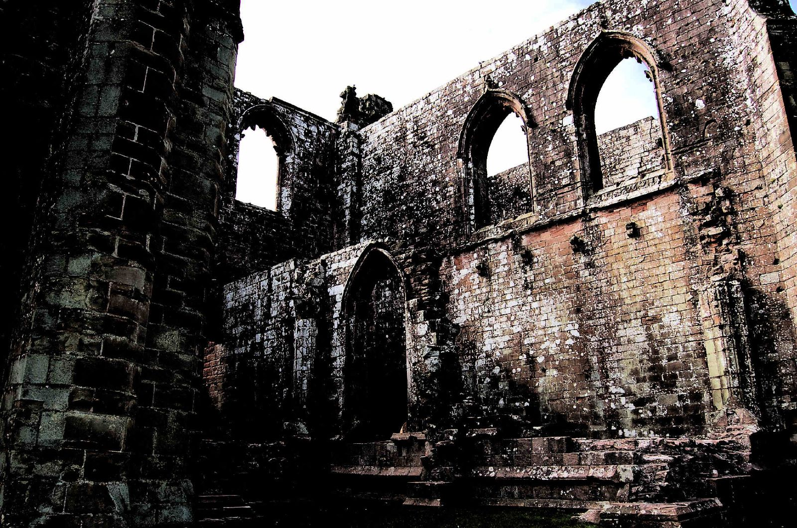 Furness Abbey